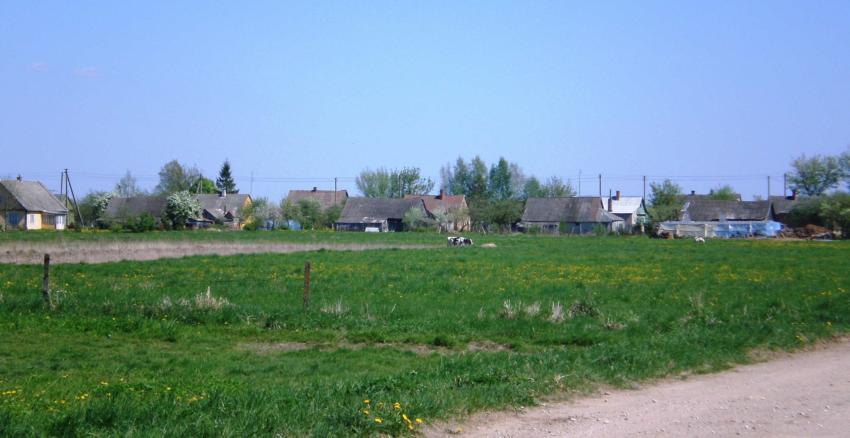 Daukainiai, Kėdainių raj.